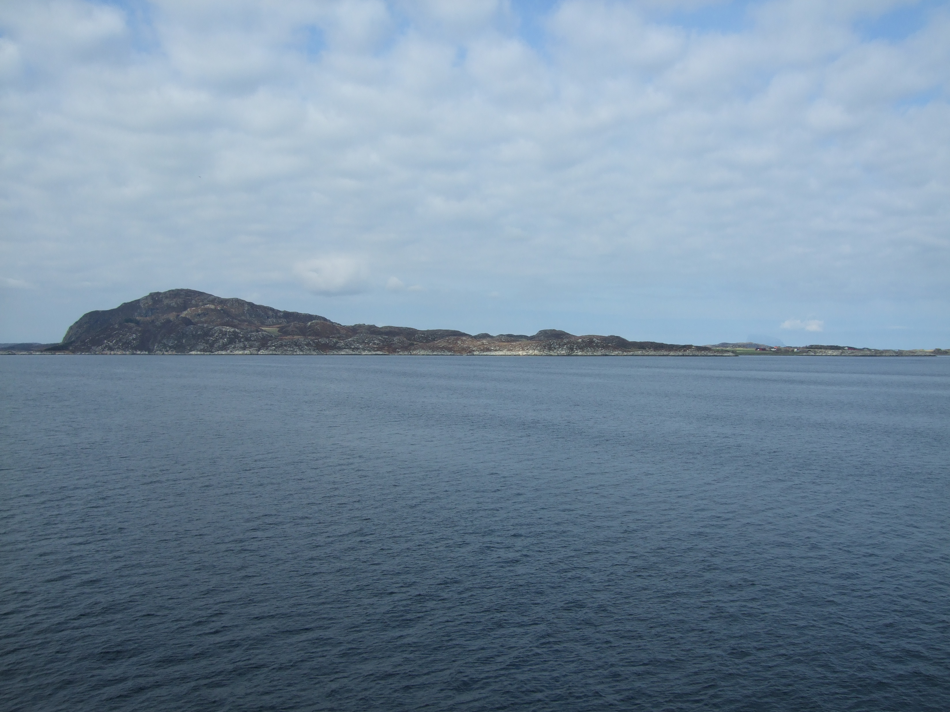 Løkta